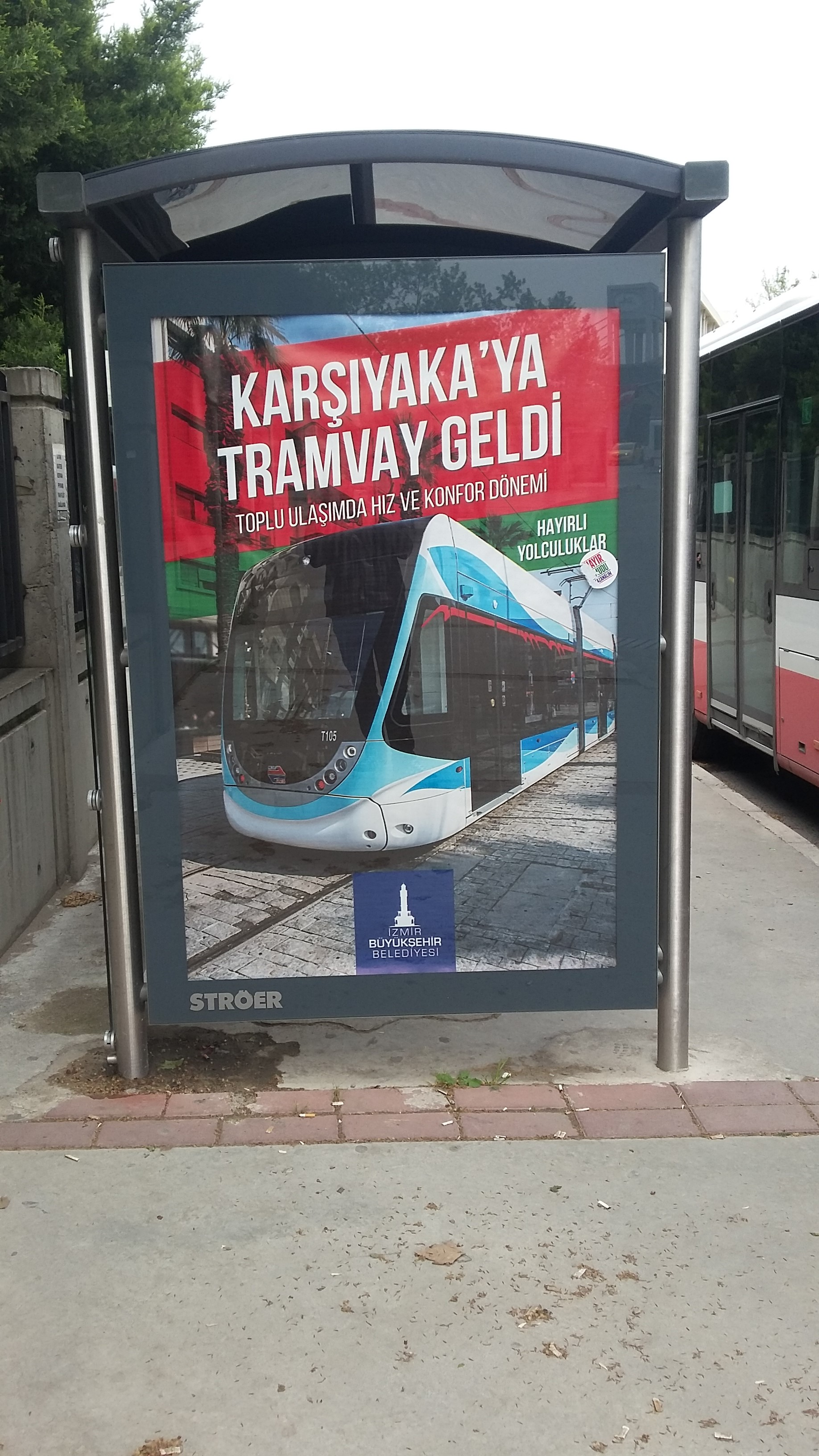 İzmir Karşıyaka'da hizmete giren tramvayların reklam panosu.